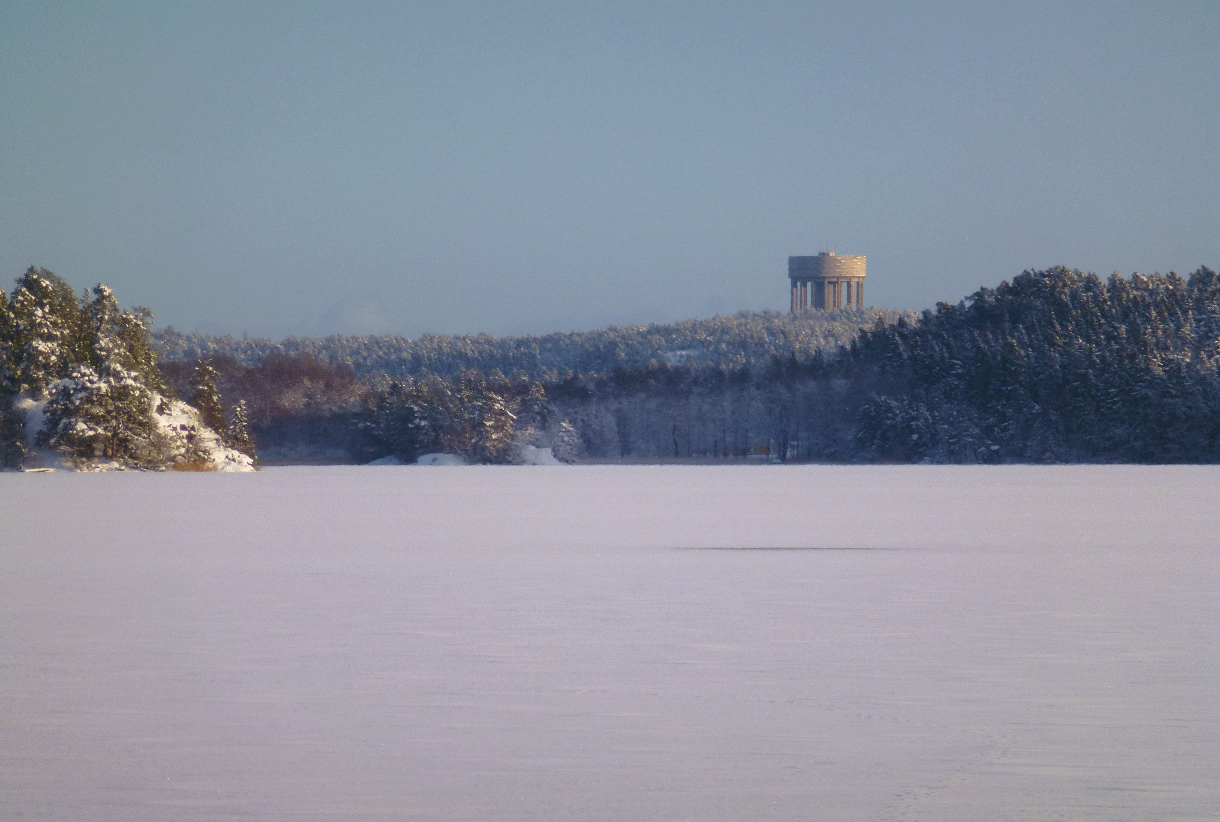 Malmviken vy mot ost med Sätra vattentorn i bakgunden